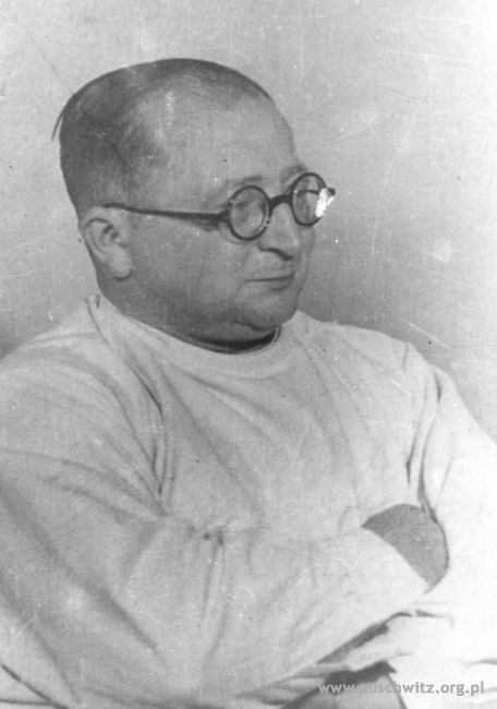 Carl Clauberg fotografato nel 1942 ad Auschwitz (Polonia) Il personaggio o i personaggi rappresentati nelle immagini, come si deduce dalla loro biografia, pubblicate in Polonia senza avviso di copyright, sono stati fotografati in Polonia anteriormente al 1952 , prima o durante il periodo della occupazione tedesca (1939–1945), ad opera di autori polacchi, per cui vale la considerazione di pubblico dominio ad opera della legge sul copyright polacca 1926–1952. Inoltre: Material belonging to the Museum may be used free of charge exclusively for non-commercial and strictly educational purposes, on the condition that its source is indicated in the following form: “ See also [1].